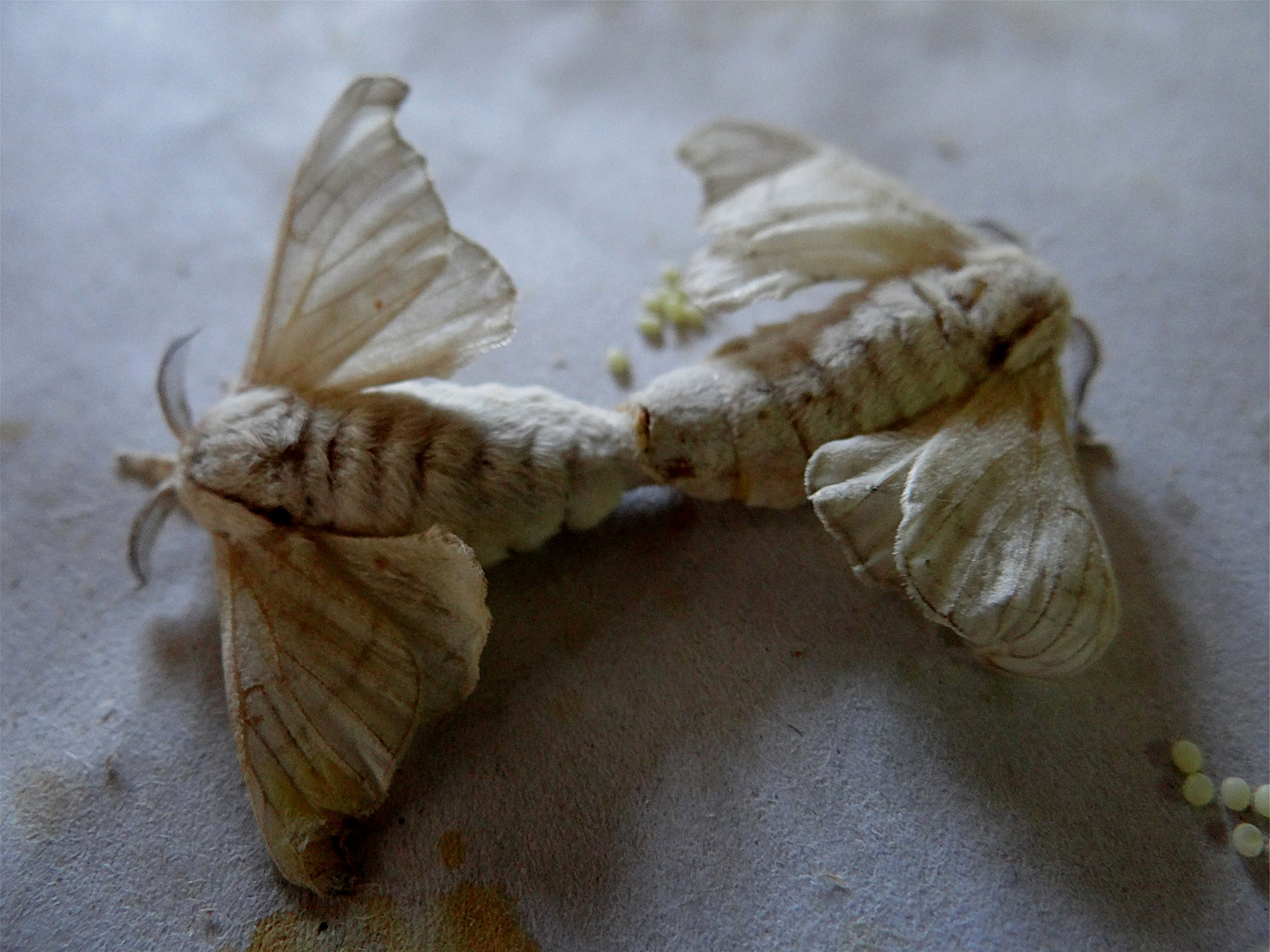 Bombyx du mûrier dans une manufacture de soie, Chiang Mai, Thaïlande